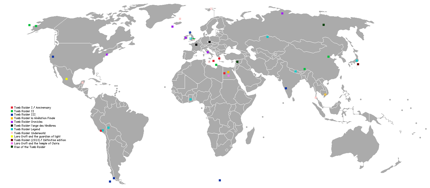 Carte qui montre tout les endroits visités par Lara Croft dans Tomb raider et sa série dérivé Lara Croft